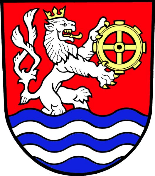 Znak obce Předměřice nad Labem